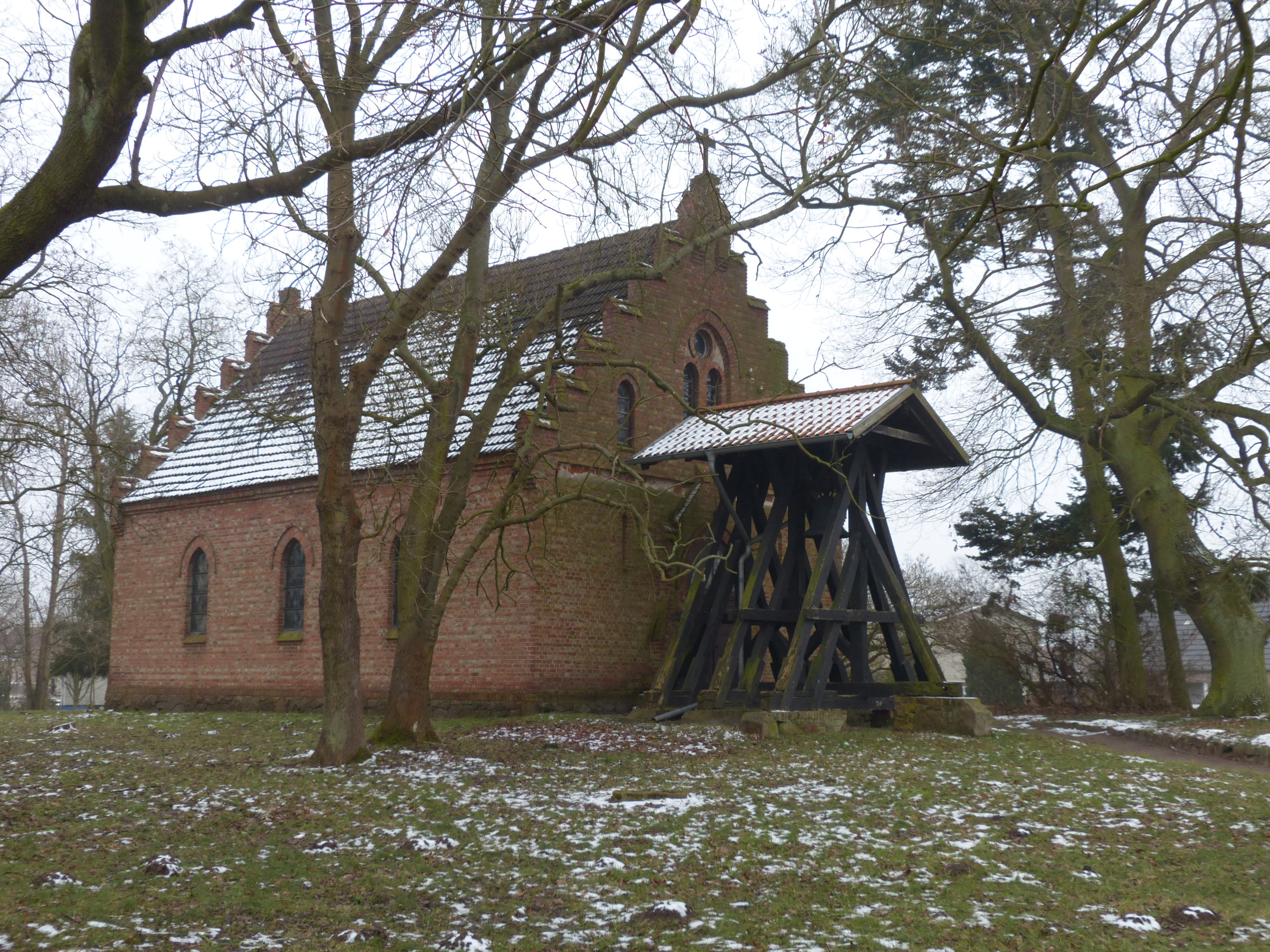 Kirche in Lübs (Vorpommern), Ansicht mit Glockenstuhl von Nordwesten